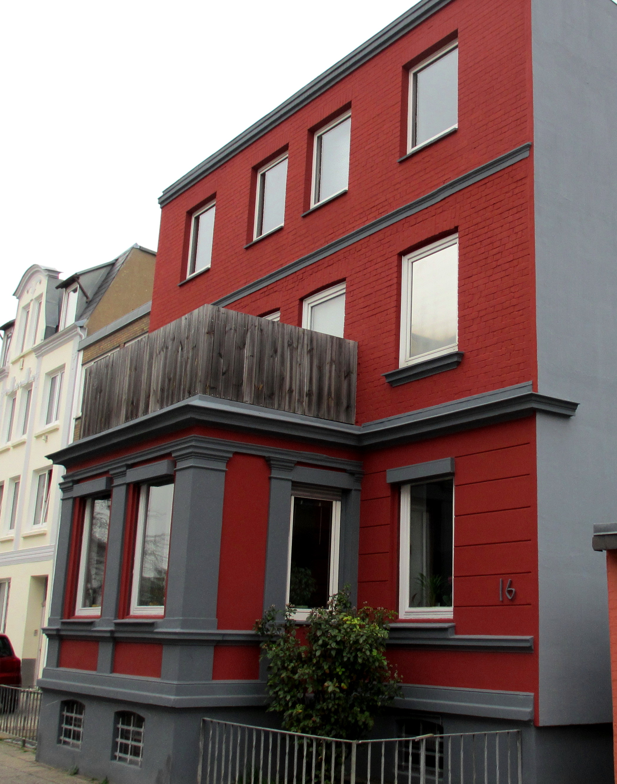 Geburtshaus von Willy Brandt, ehemaliges Wohnhaus seiner Mutter Martha Frahm, Meierstraße in Lübeck (2013)